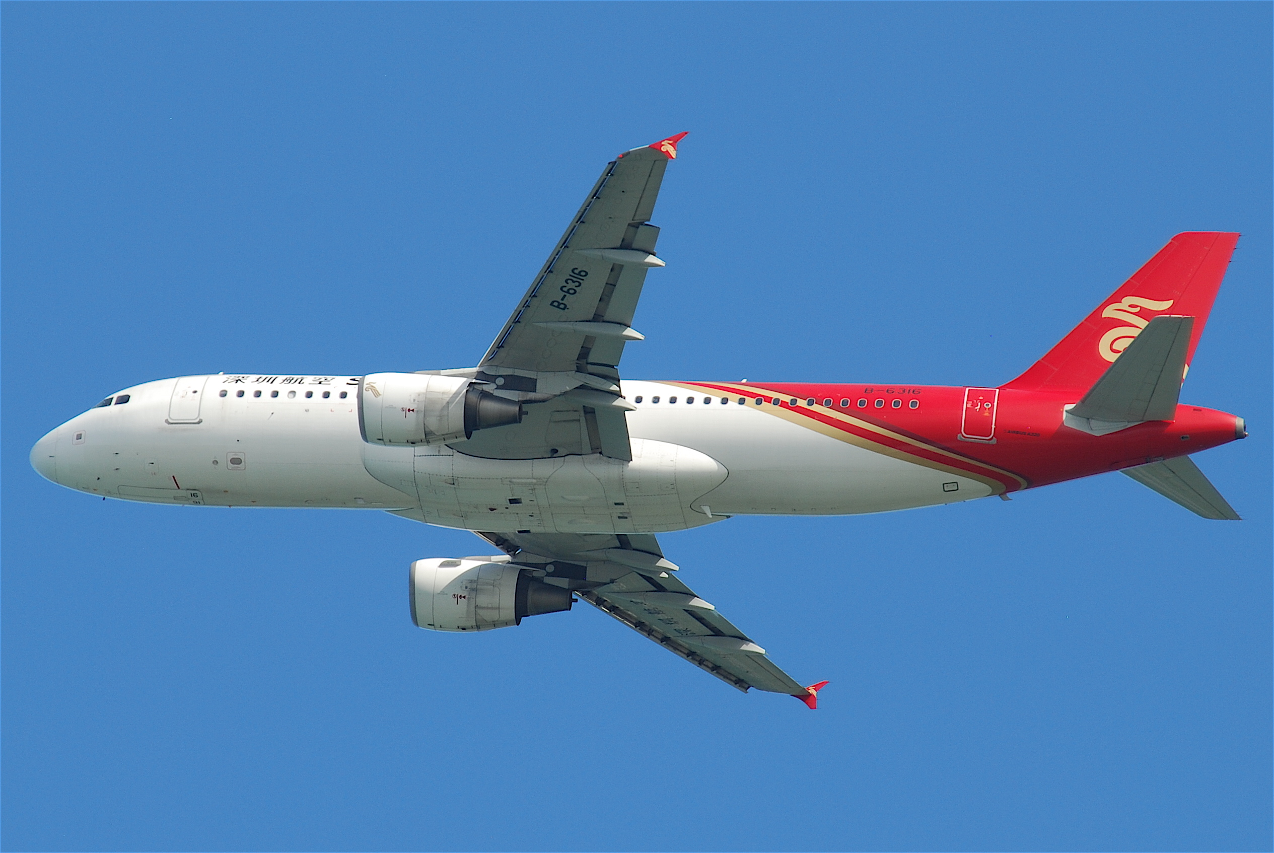 Shenzhen Airlines Airbus A320-214; B-6316@HKG;31.07.2011/614tg